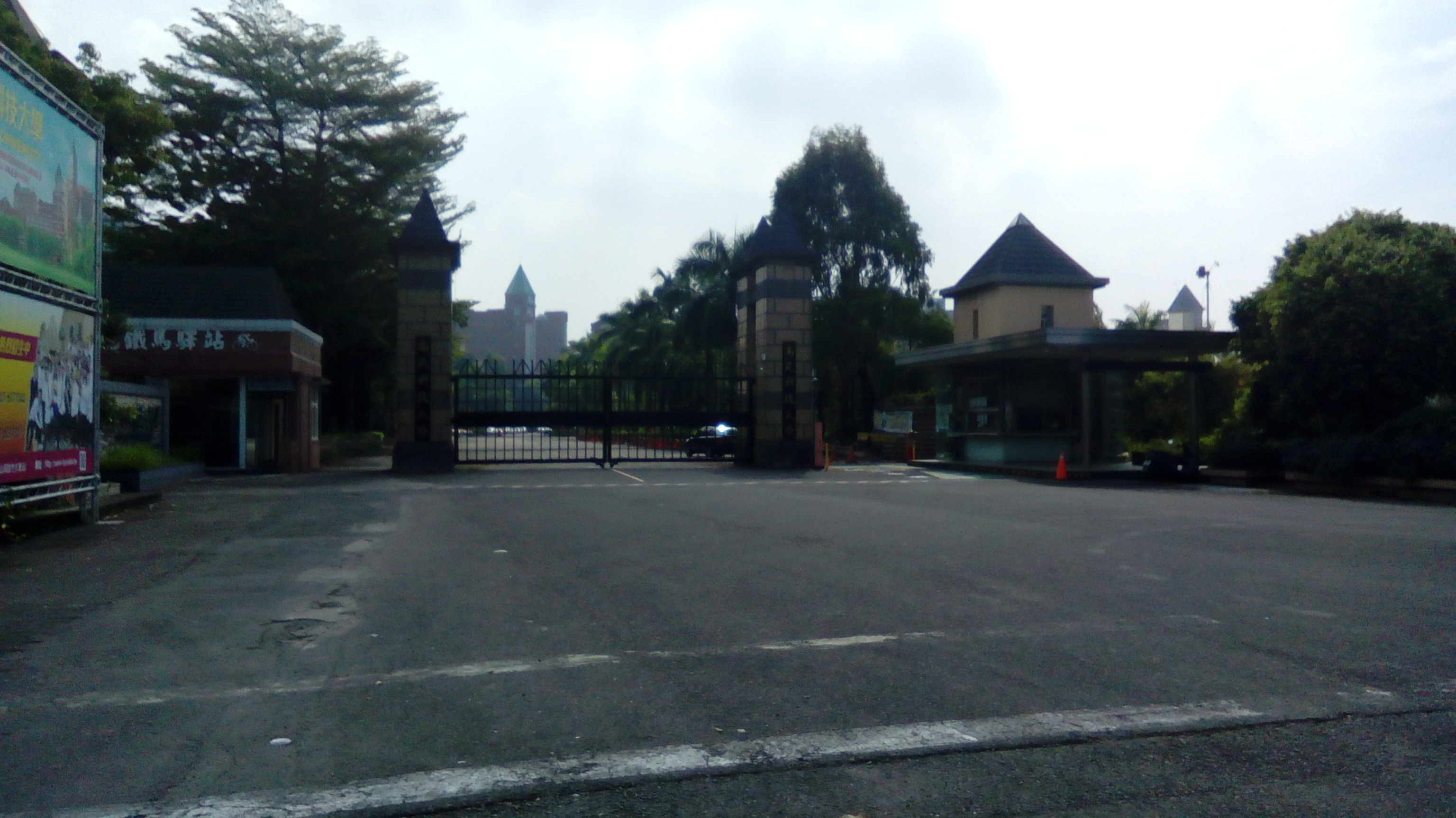 高苑科技大學正門